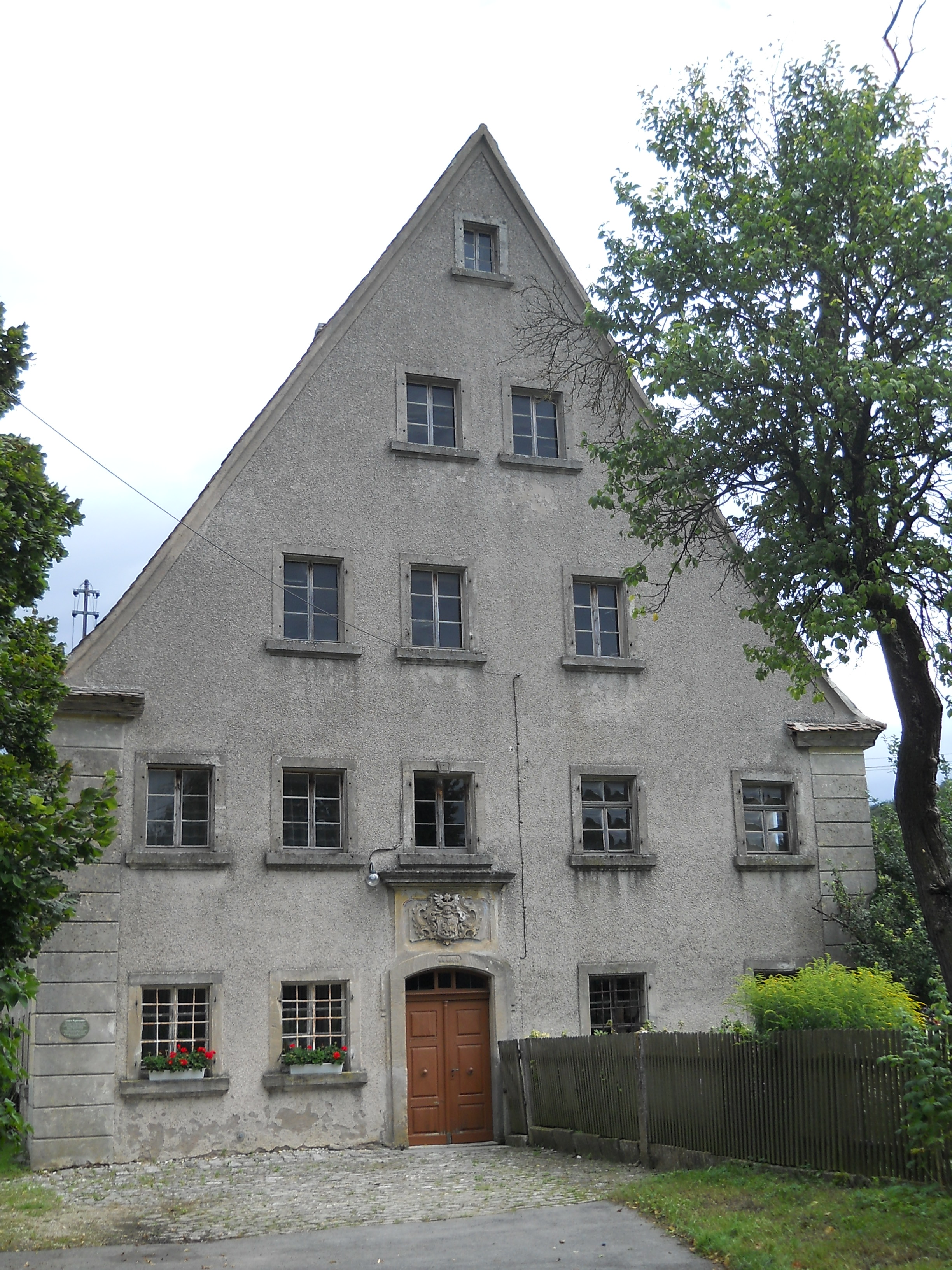 Untere Papiermühle, Ortsteil der Stadt Treuchtlingen im mittelfränkischen Landkreis Weißenburg-Gunzenhausen (Bayern), Mühlengebäude von 1765